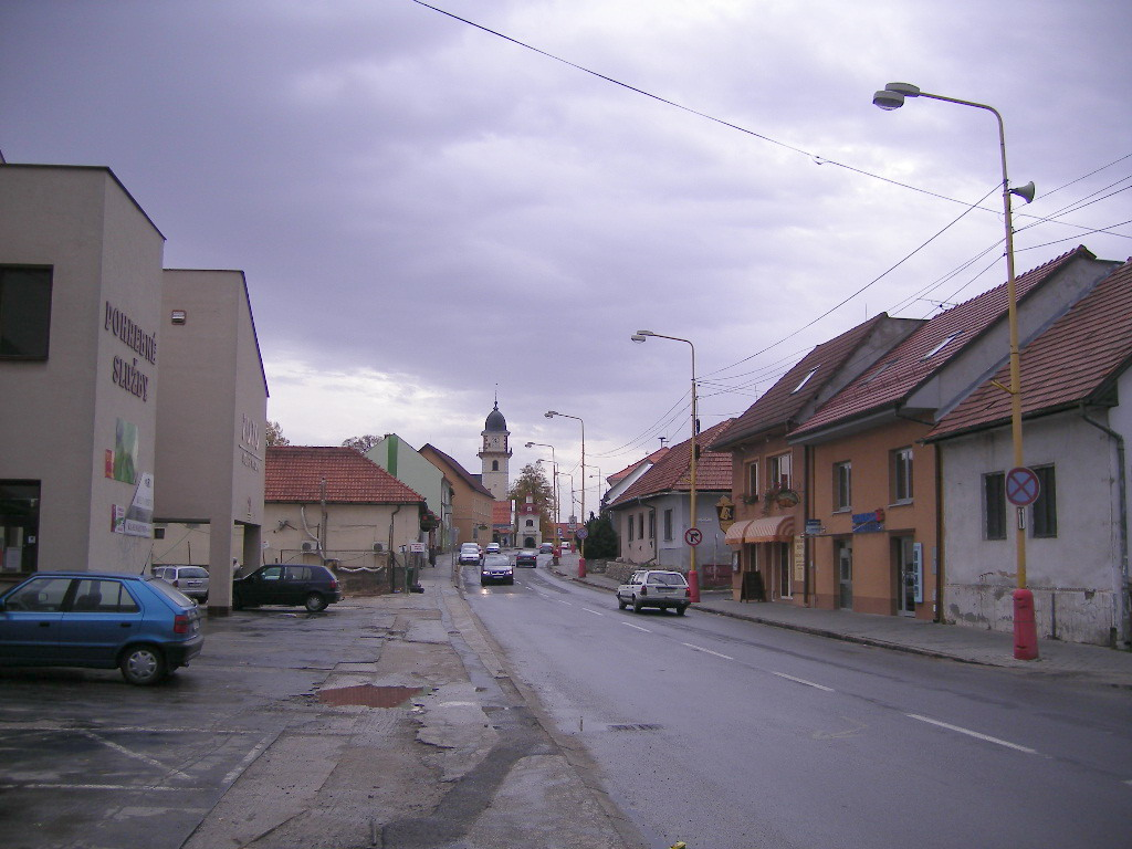 Bojnice - Sládkovičova ulica